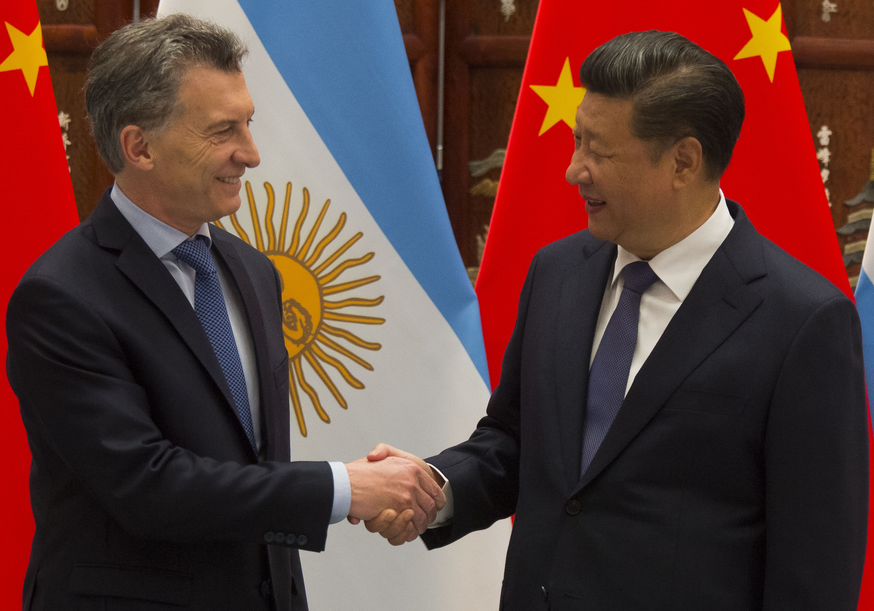 El presidente argentino Mauricio Macri junto al presidente chino Xi Jinping